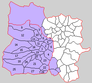 福島県信夫郡の町村。